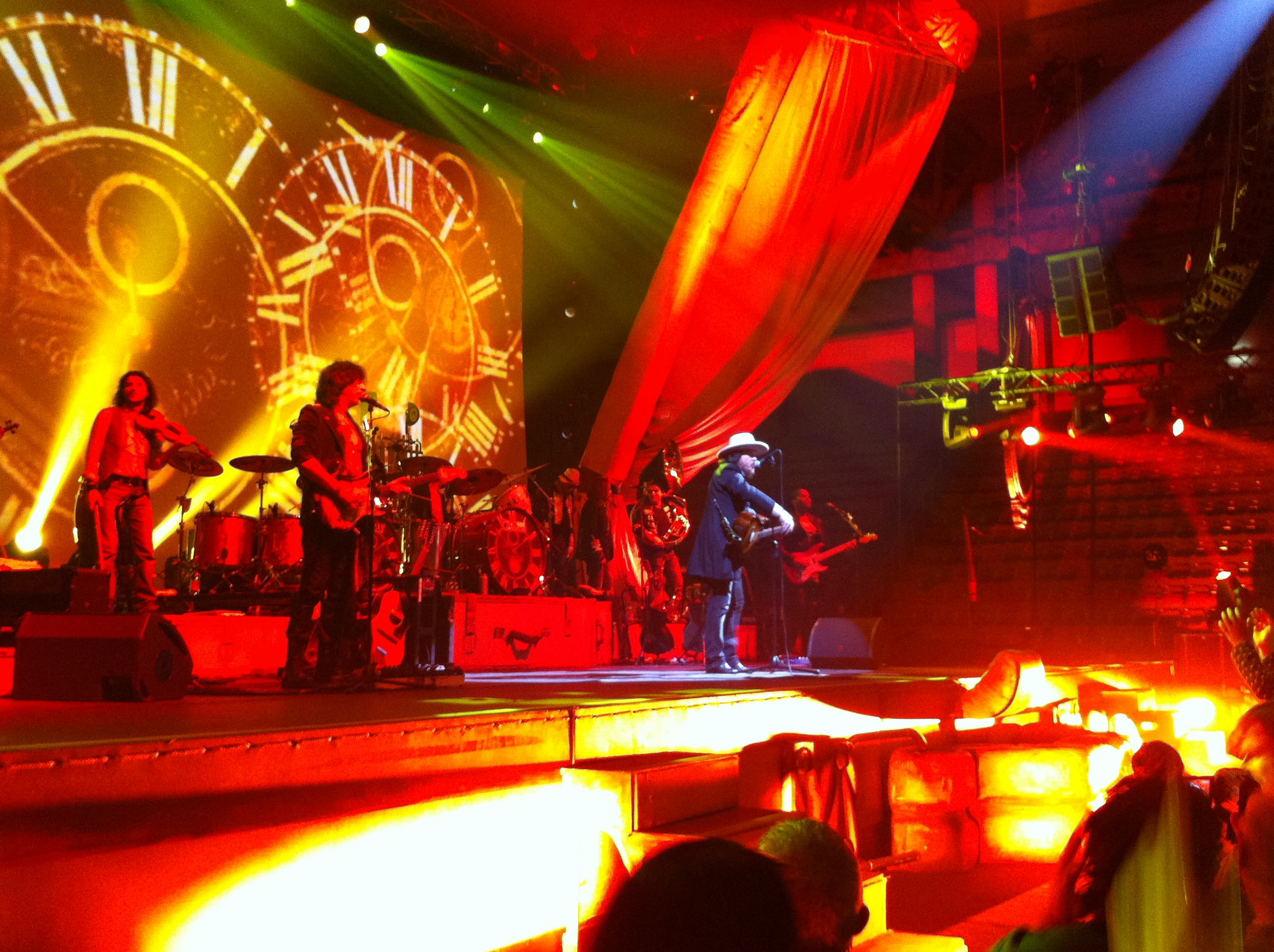 Foto fatta personalmente da me raffigurante Zucchero Fornaciari durante un concerto ad Acireale 2011